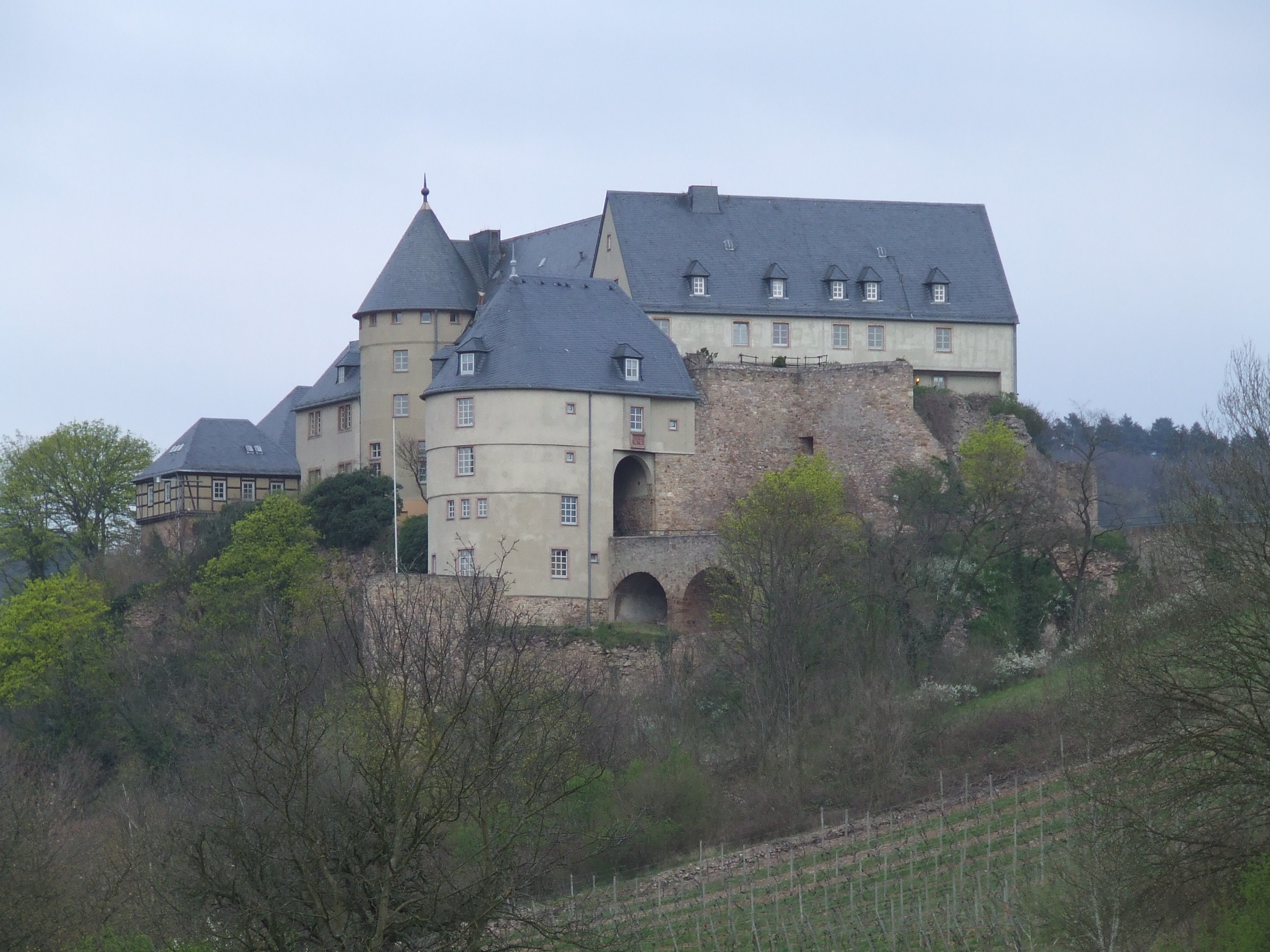 Die Ebernburg in Bad Münster-Ebernburg, Westansicht, fotografiert vom unteren Ende der Zufahrtstraße K 95